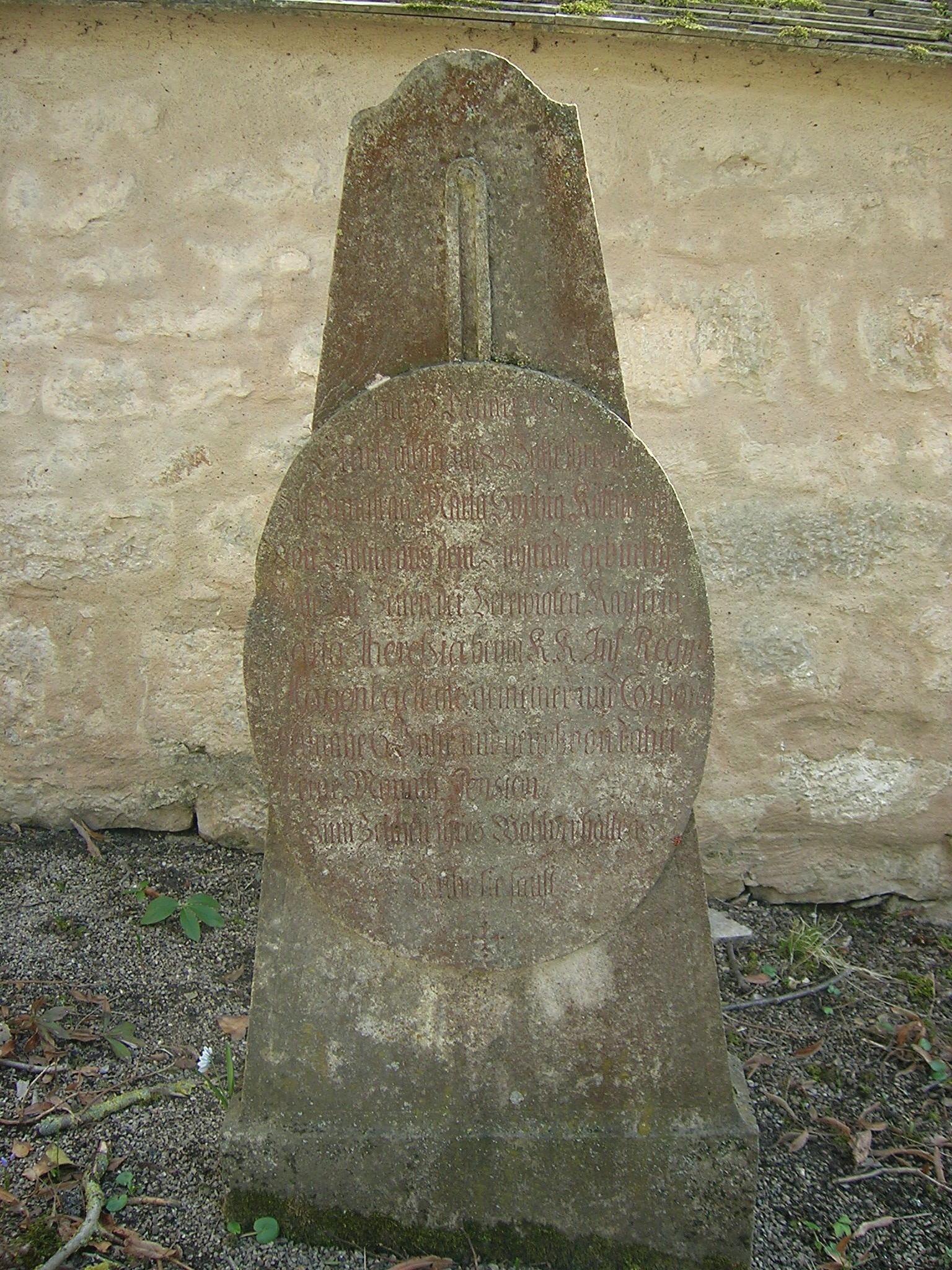 Grabstein der Jungfrau Maria Sophia Köttnerinn am Westenfriedhof Eichstätt. Inschrift:[1] Am 22. Jenner 1802 starb allhier im 82. Jahr ihres alters die Jungfrau Maria Sophia Köttnerinn von Titting aus dem Eichstädt gebürtig, diente Zur Zeiten der Verewigten Kayserin Maria Thereßia beym K. K. Inf. Regmt. v. Hagenbach als gemeiner und Corporal beynahe 6 Jahr und genoß von daher eine Monath. Pension von 8 fl. zum Zeichen ihres Wohlverhaltens. Ruhe sie sanft.